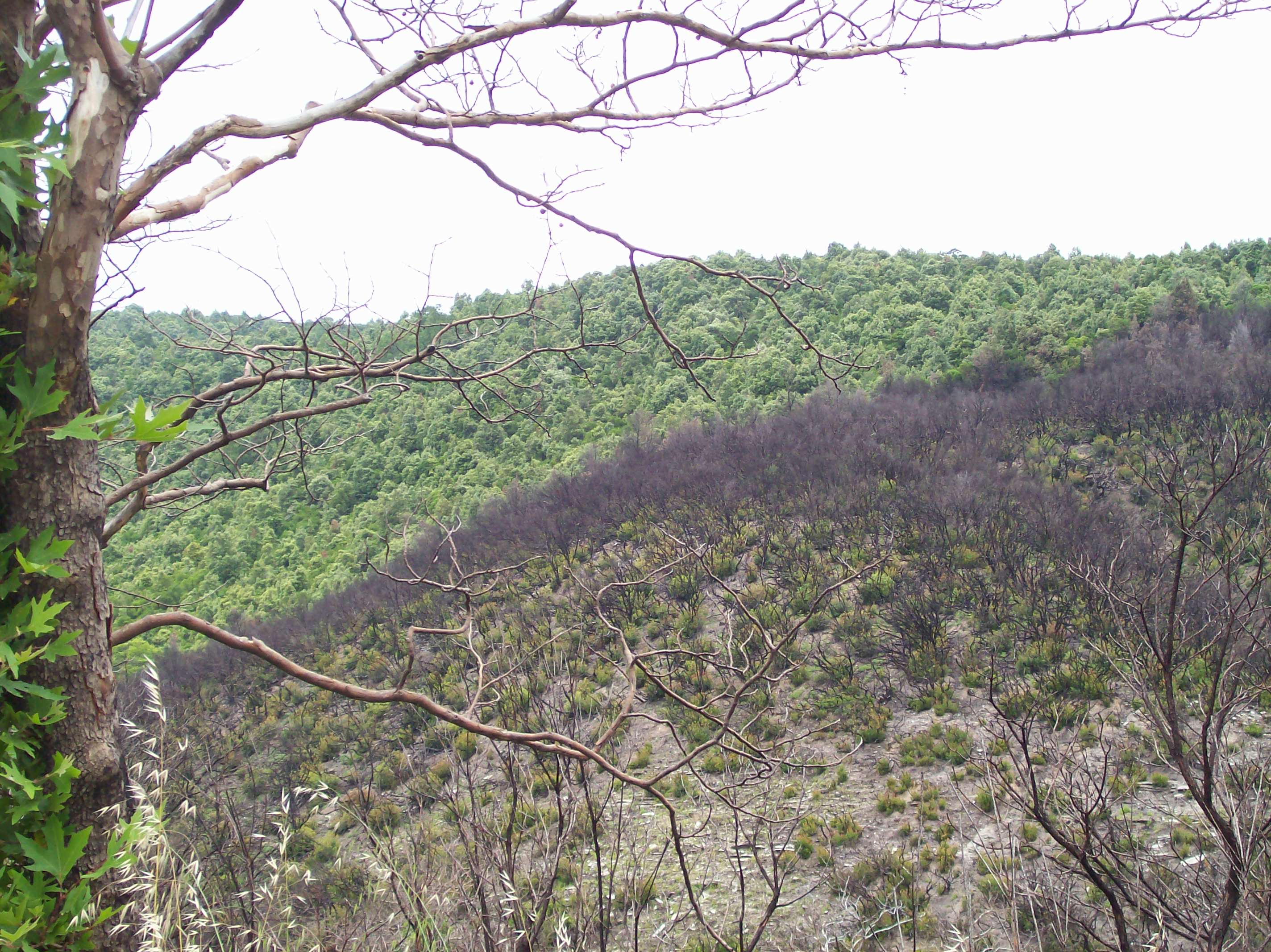 Traces laissées par des incendies ayant ravagés le Pélion (Grèce) à l'été 2007.